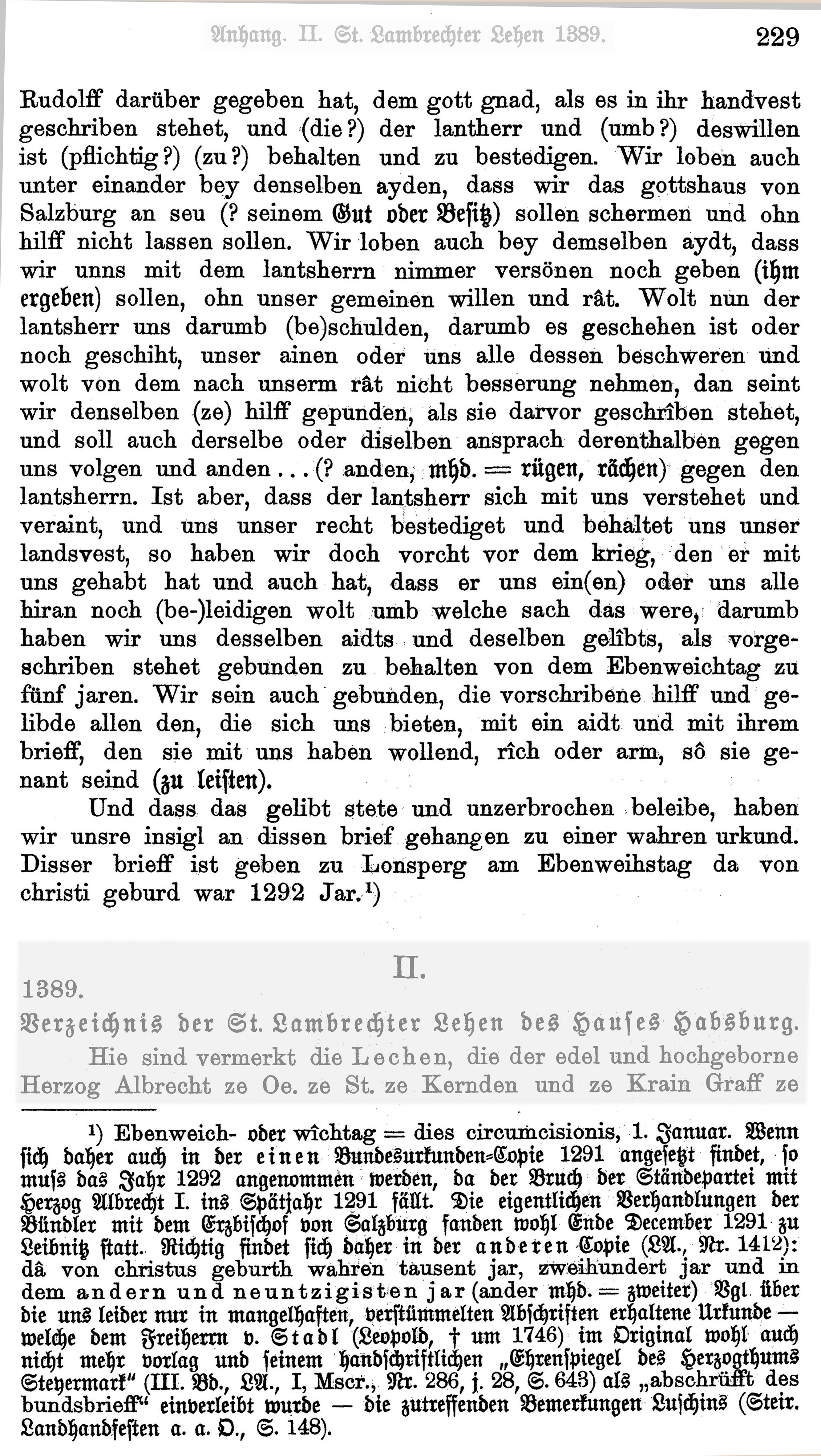 Abschrift der Urkundes des Landsberger Bundes aus dem Jahr 1292, einer Verschwörung von Adeligen in der Steiermark gegen Albrecht I. von Habsburg. Kopie aus: Franz Xaver von Krones (1835-1902): Landesfürst, Behörden und Stände des Herzogthums Steier 1283–1411. Verlag Styria Graz 1900. Seite 229.